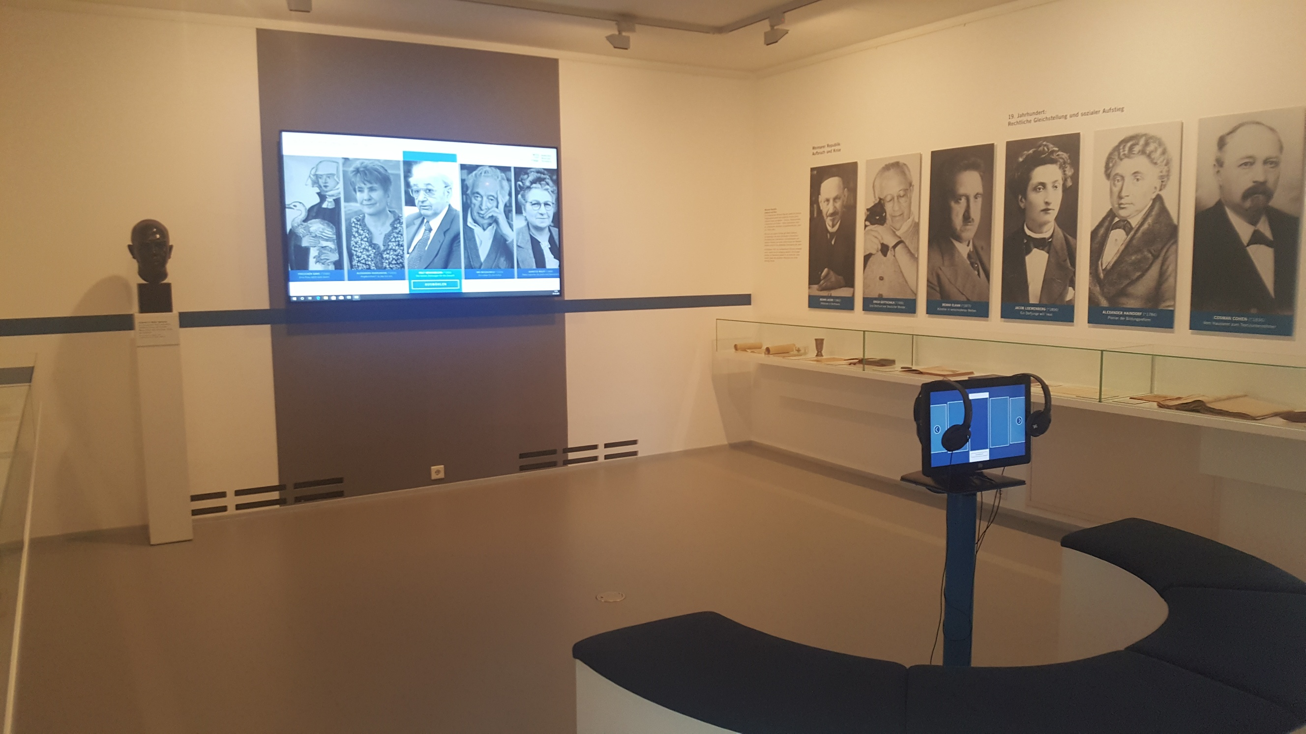 Mdienstation, Fotografien und Vitrinen zu ausgewählten jüdischen Lebenswegen in Westfalen Neue Dauerausstellung "L'chaim! Auf das Leben! Jüdisch in Westfalen. 2018.